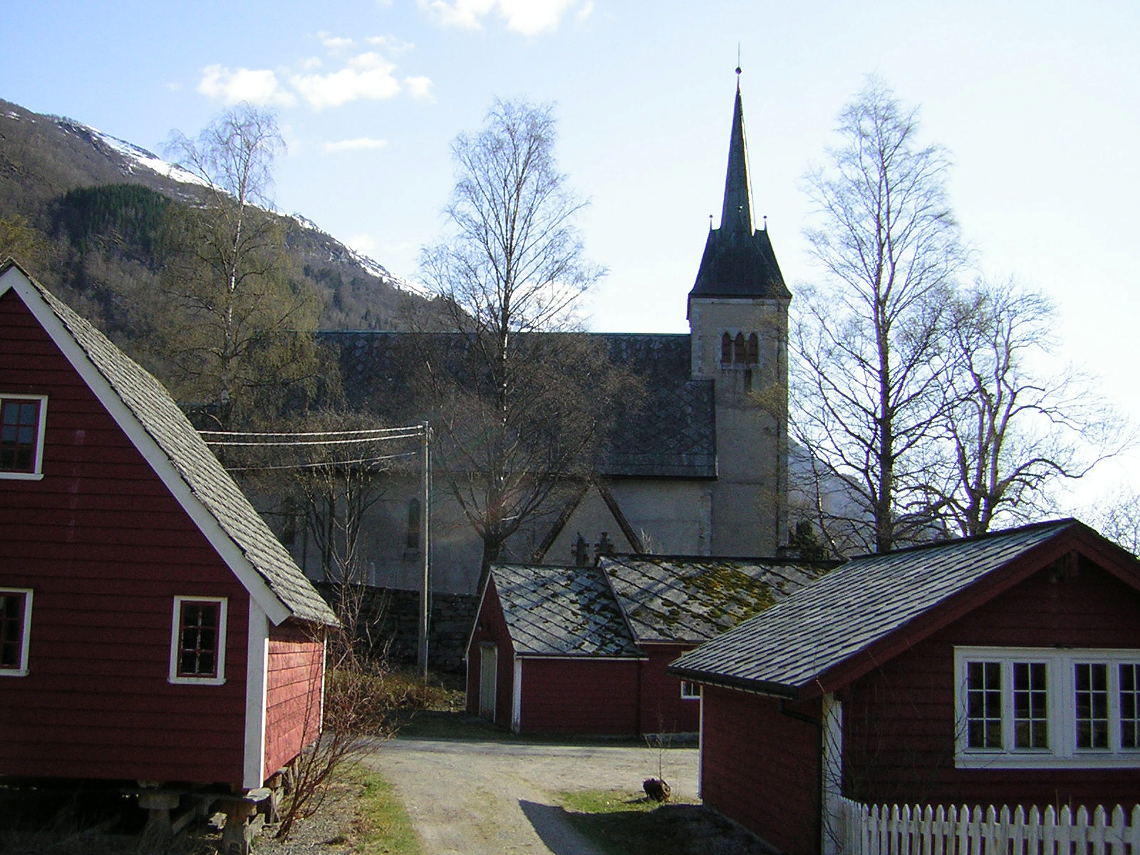 Ullensvang prestegård, like ved Ullensvang kirke i Lofthus. Foto: Siv Nytrøen Leden, fra Kulturminnebilder.no.